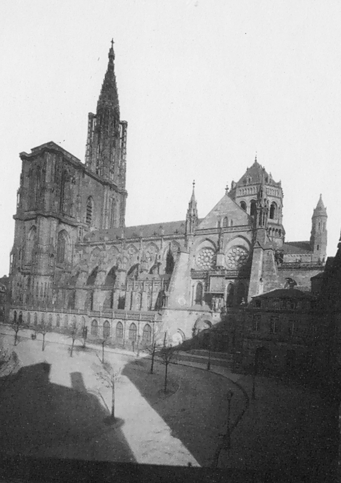 Deutsch-Französischer Krieg, Belagerung von Straßburg, Straßburger Münster